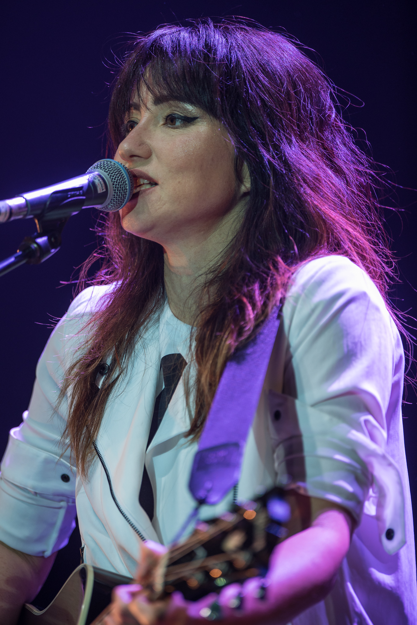 Concertbüro Franken,KT Tunstall,Kate Victoria „KT“ Tunstall,Konzert,Livekonzert,Livemusik,Meistersingerhalle